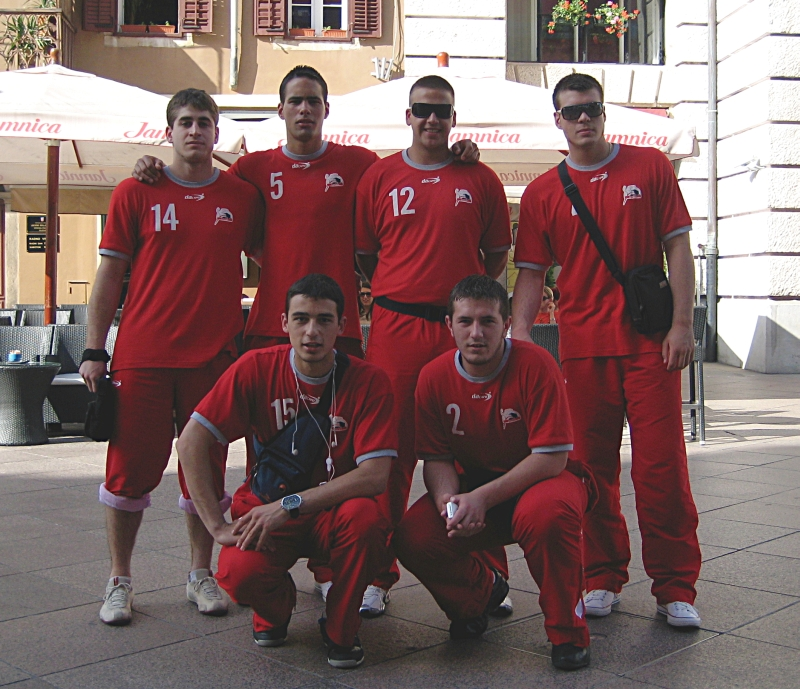 rukometaši RK Lovćena iz Cetinja u Rijeci